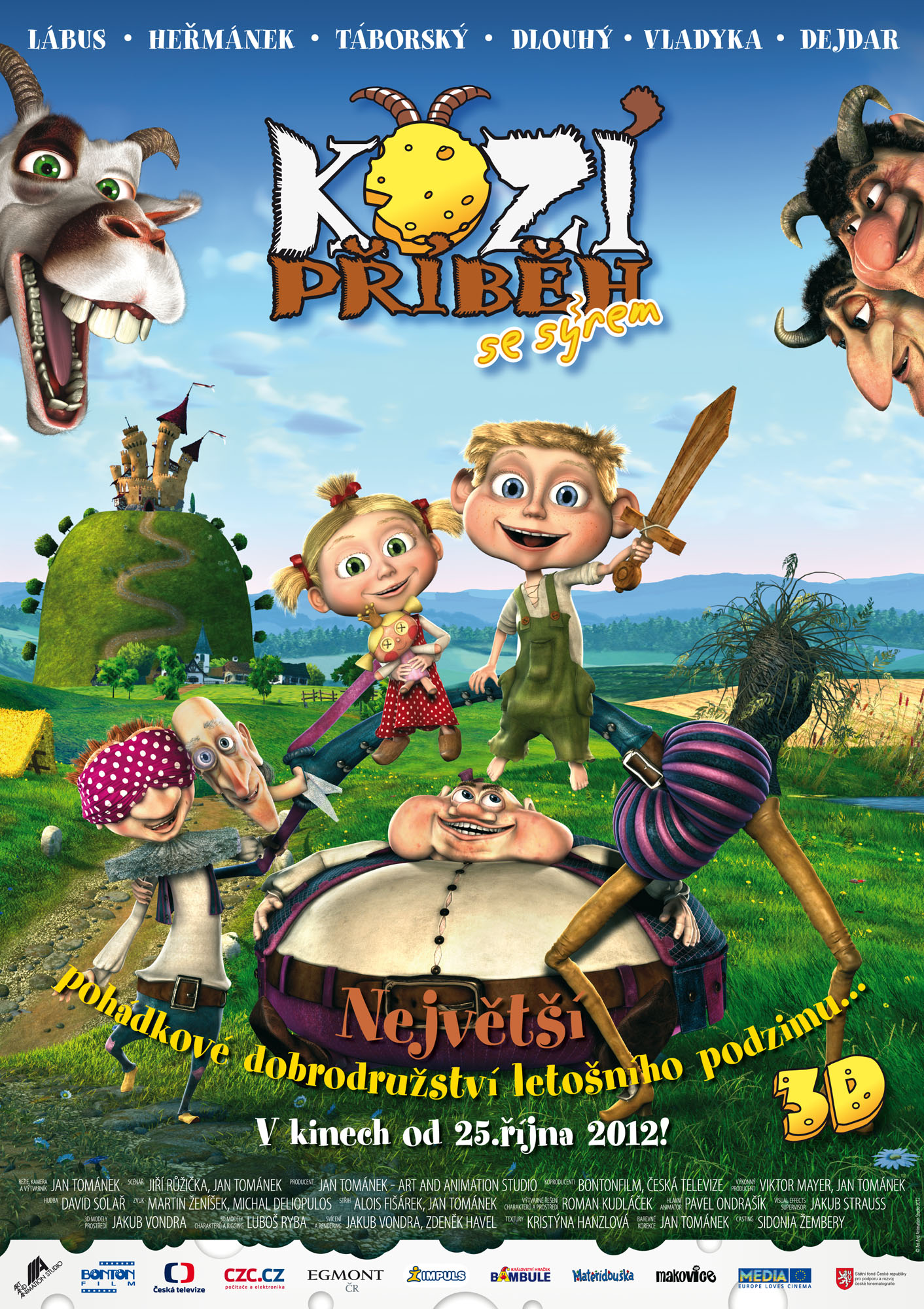 Kozí příběh 2 - Plakát